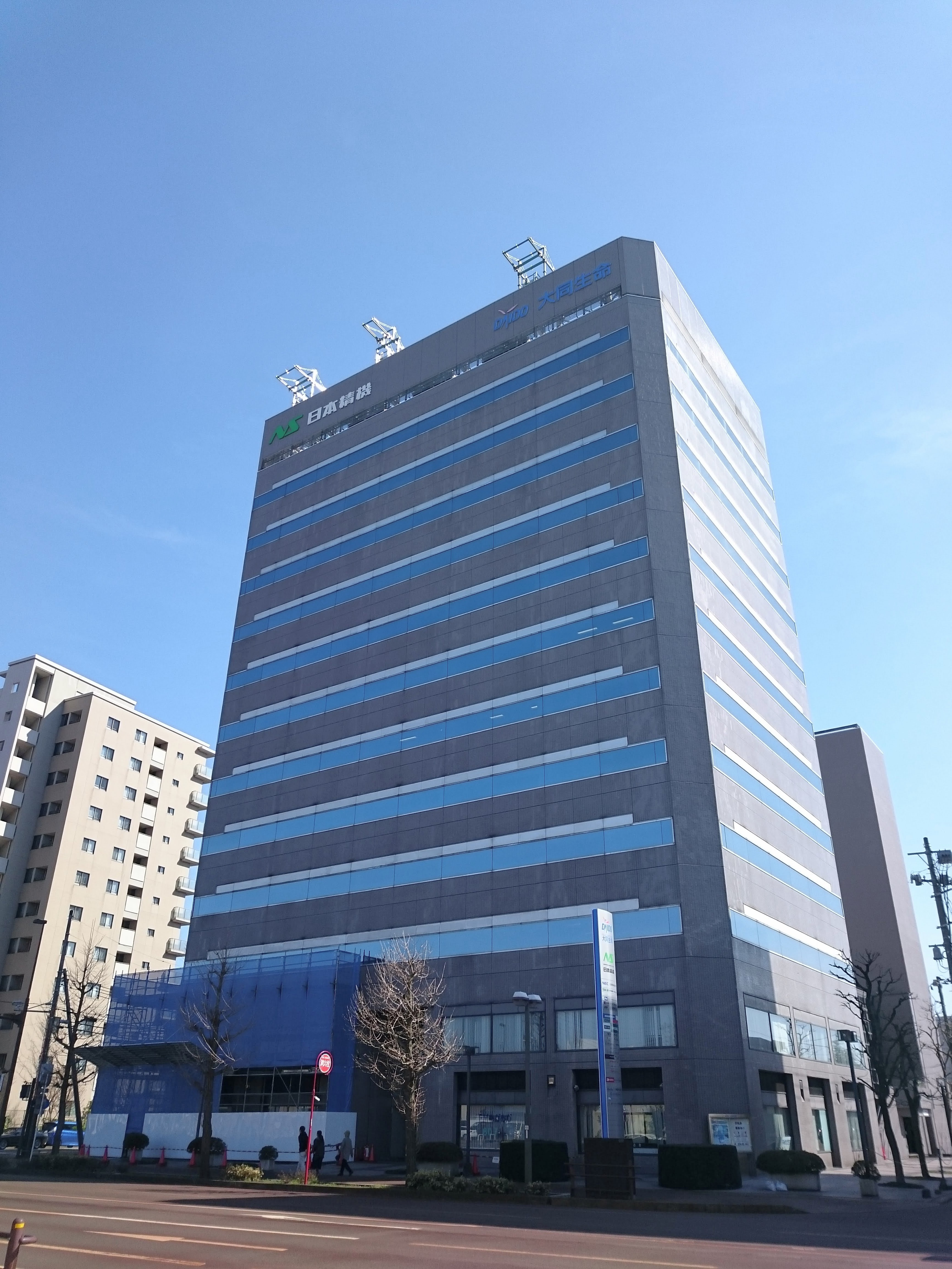 DNビル長岡の外観